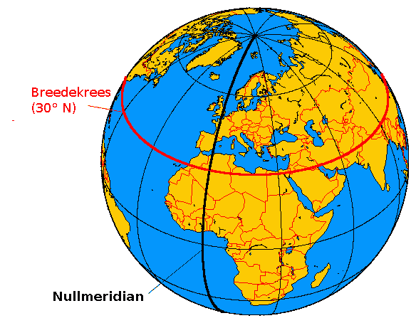 Traduction en luxembourgeois du fichier File:Breitenkreis-und-Nullmeridian.png